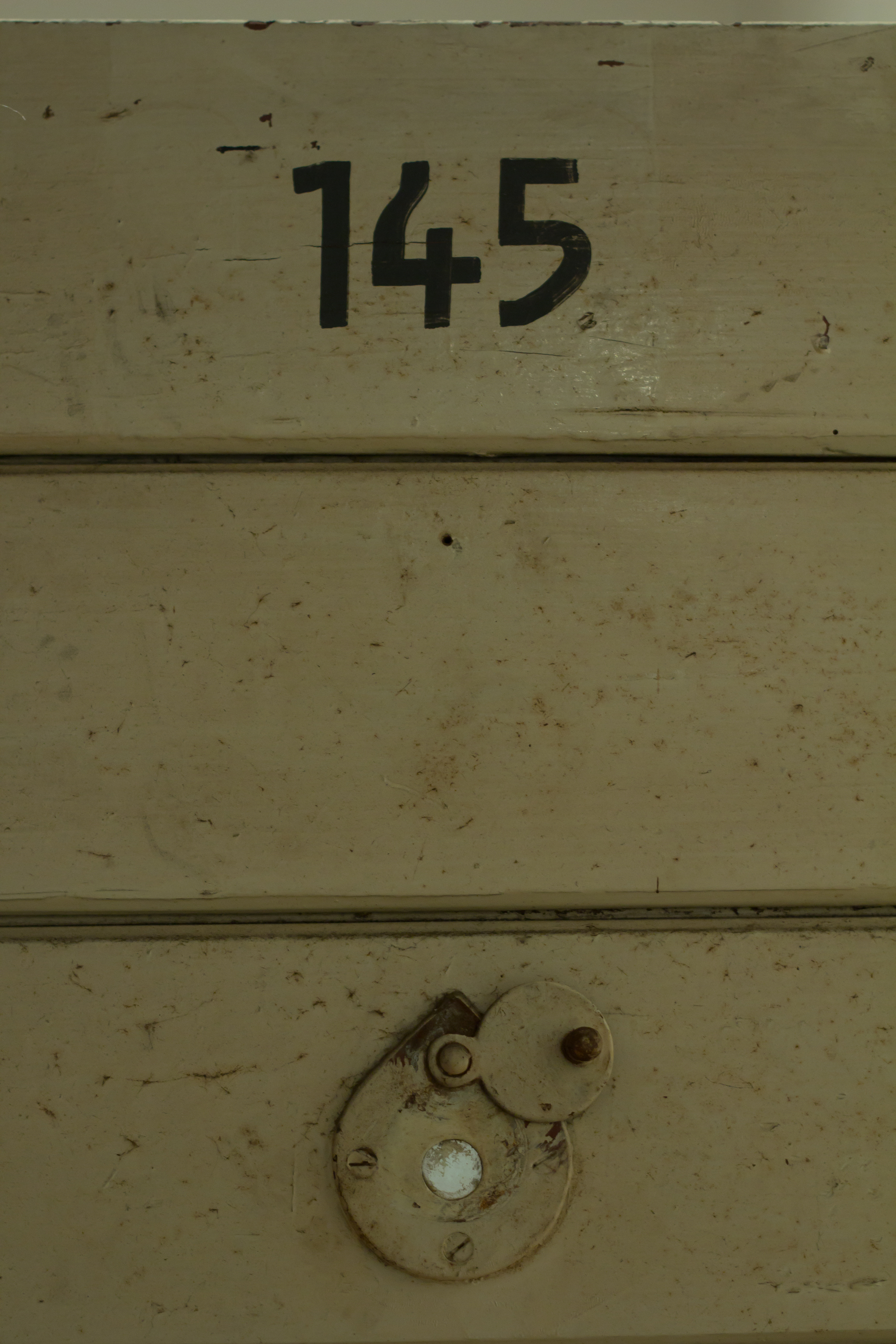 Zellentür des ehemaligen Gefängnisses Klingelpütz in Köln. Depotbestand, Ausstellung Depot 1. Museum of Köln city Native nameKölnisches StadtmuseumLocationCologneCoordinates50° 56′ 28.58″ N, 6° 57′ 00.6″ E Established1888Web pageKölnisches StadtmuseumAuthority control : Q881214 VIAF: 123987826 ISNI: 0000 0001 2106 4589 LCCN: n50047754 GND: 2015828-2 SUDOC: 167192442 WorldCat institution QS:P195,Q881214